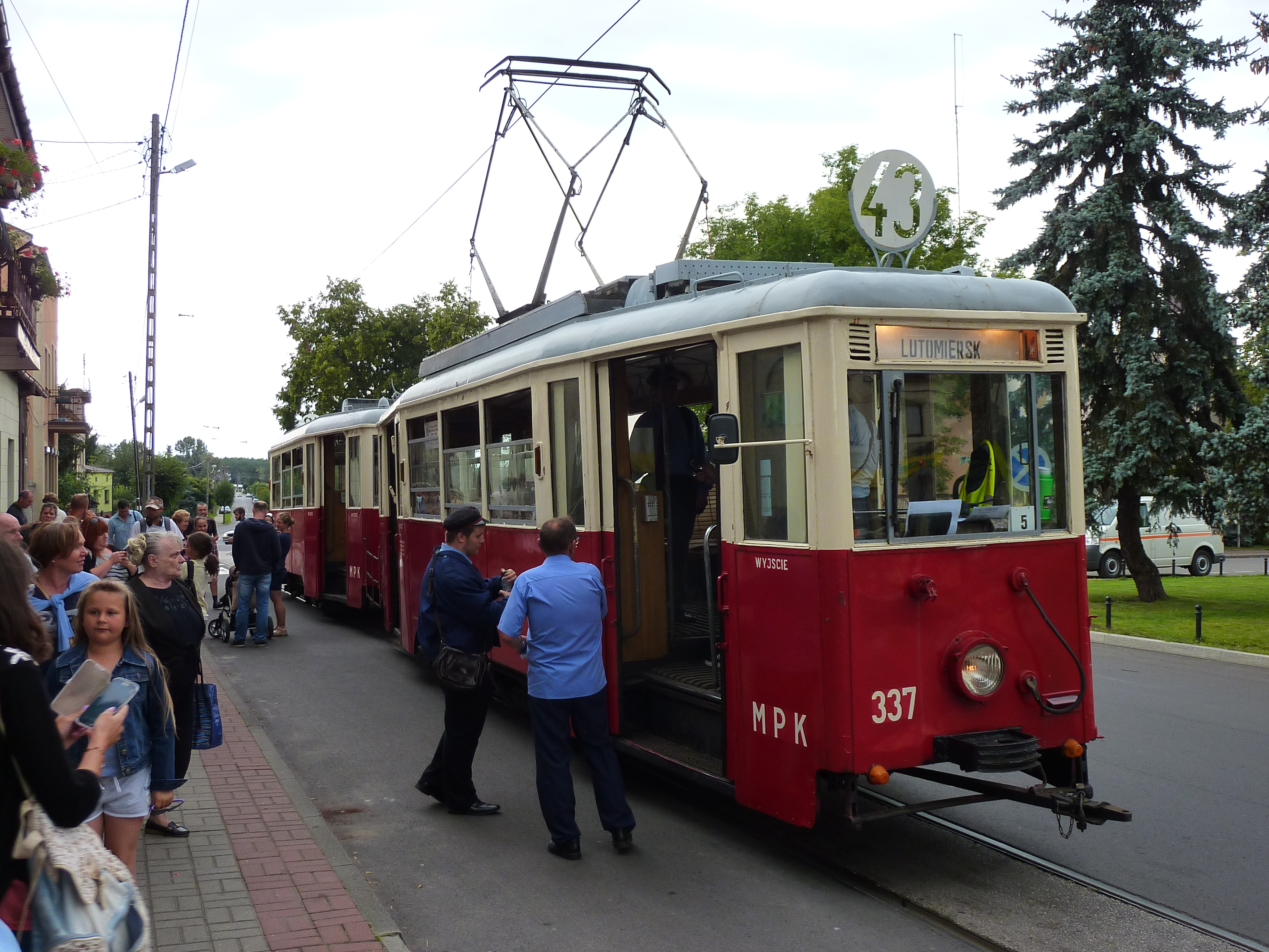 Skład 5N+5ND Tramwajowej Linii Turystycznej na linii 43 na pętli w Lutomiersku (pl. Jana Pawła II).